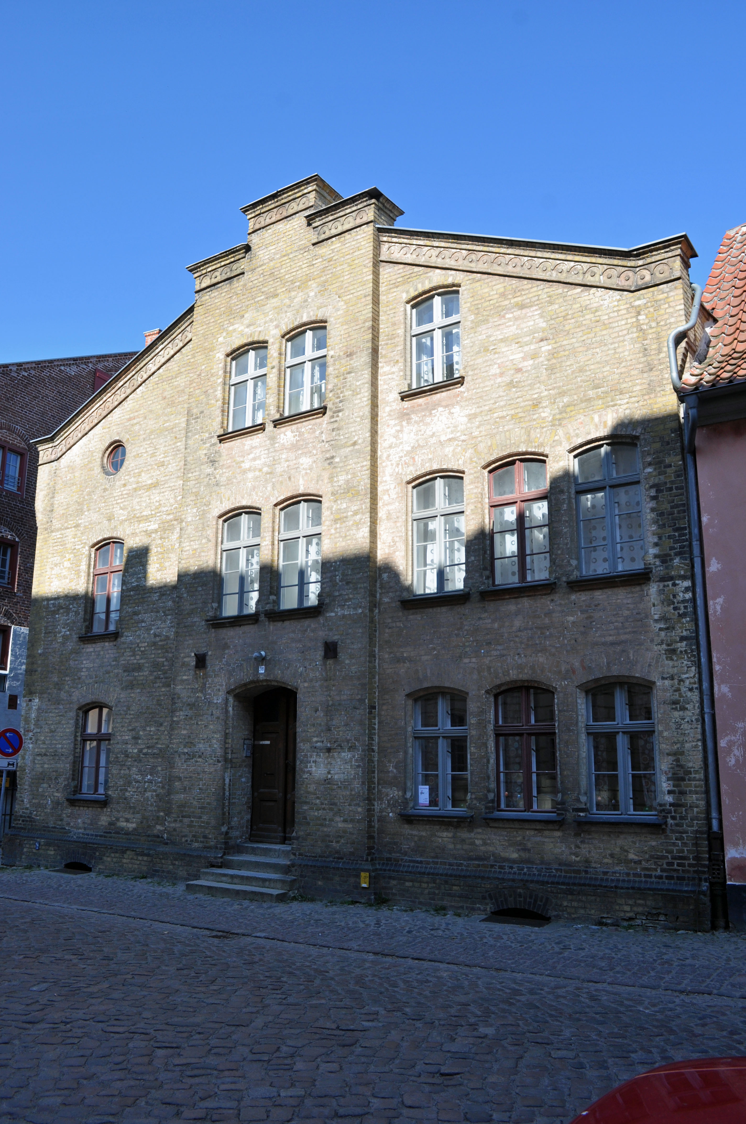 Gebäude bzw. Gebäudedetail in Stralsund. Straße und Hausnummer siehe Dateiname.